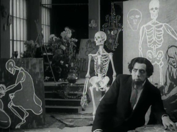 Andreï Gromov dans "La Mort du cygne" 1917